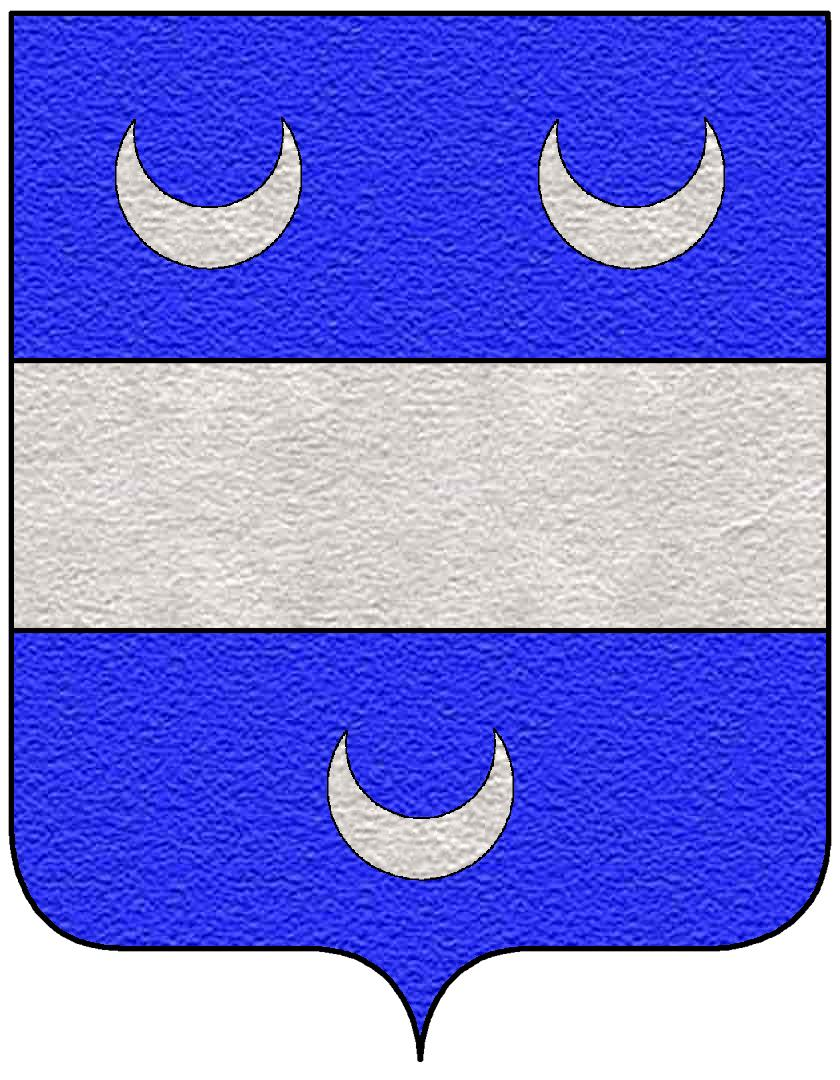 Stemma della famiglia Tolomei